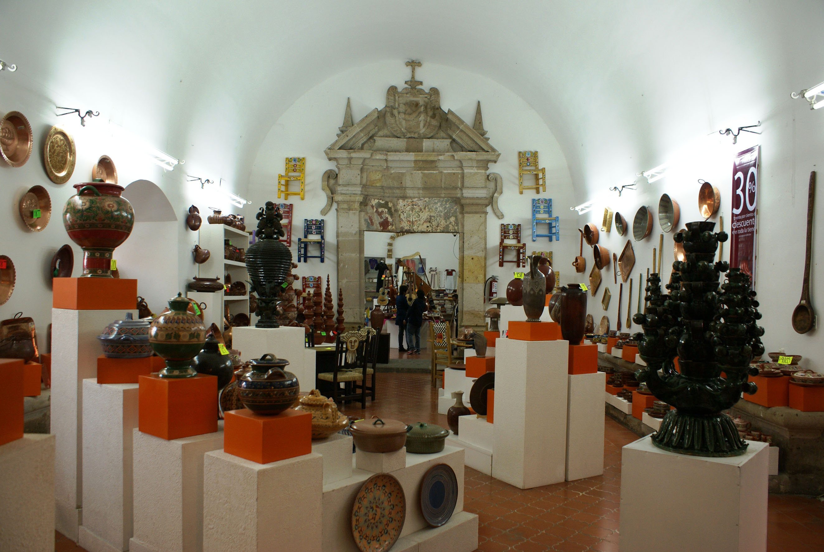 Casa de las Artesanías de Michoacán, recinto cultural público ubicado en la ciudad de Morelia, Michoacán, México; enfocado en la conservación y difusión del arte popular de las distintas regiones del estado, tiene su sede en un ex convento del siglo XVI.